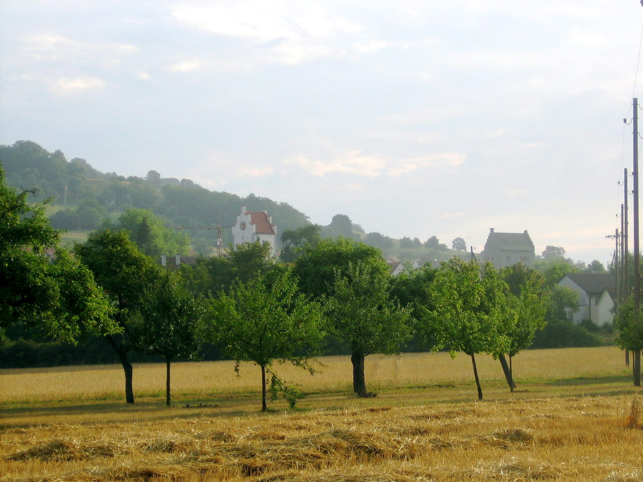 Ortsteil Riedheim der Gemeinde Hilzingen von Süden aus fotografiert.